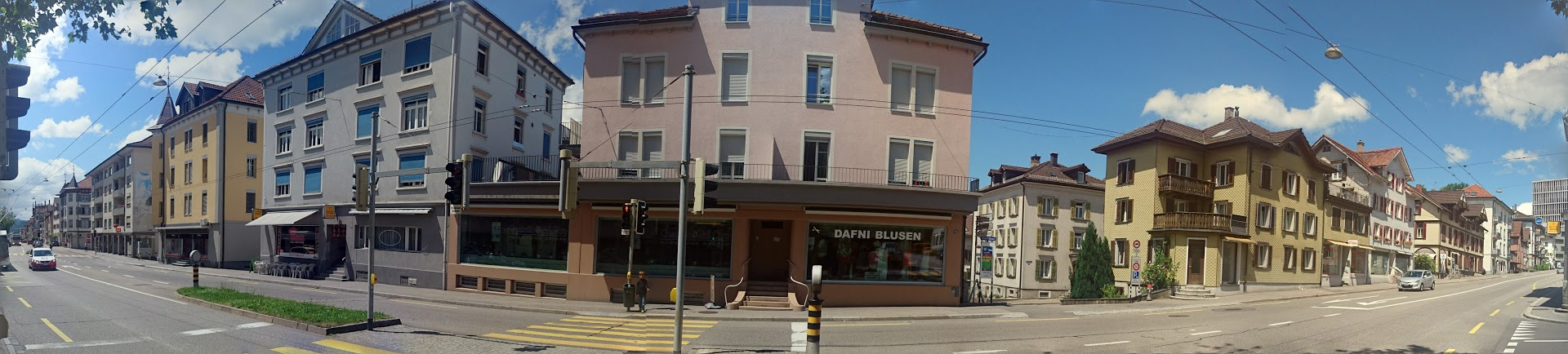 Panorama der nördlichen Häuserzeile im Lachen-Quartier, St. Gallen